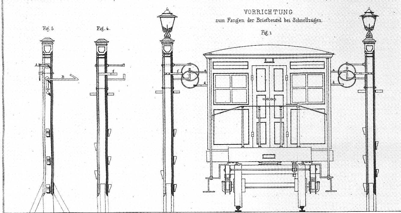 Auffang- und Abgabevorrichtung von Briefbeuteteln, Lithographie von 1853